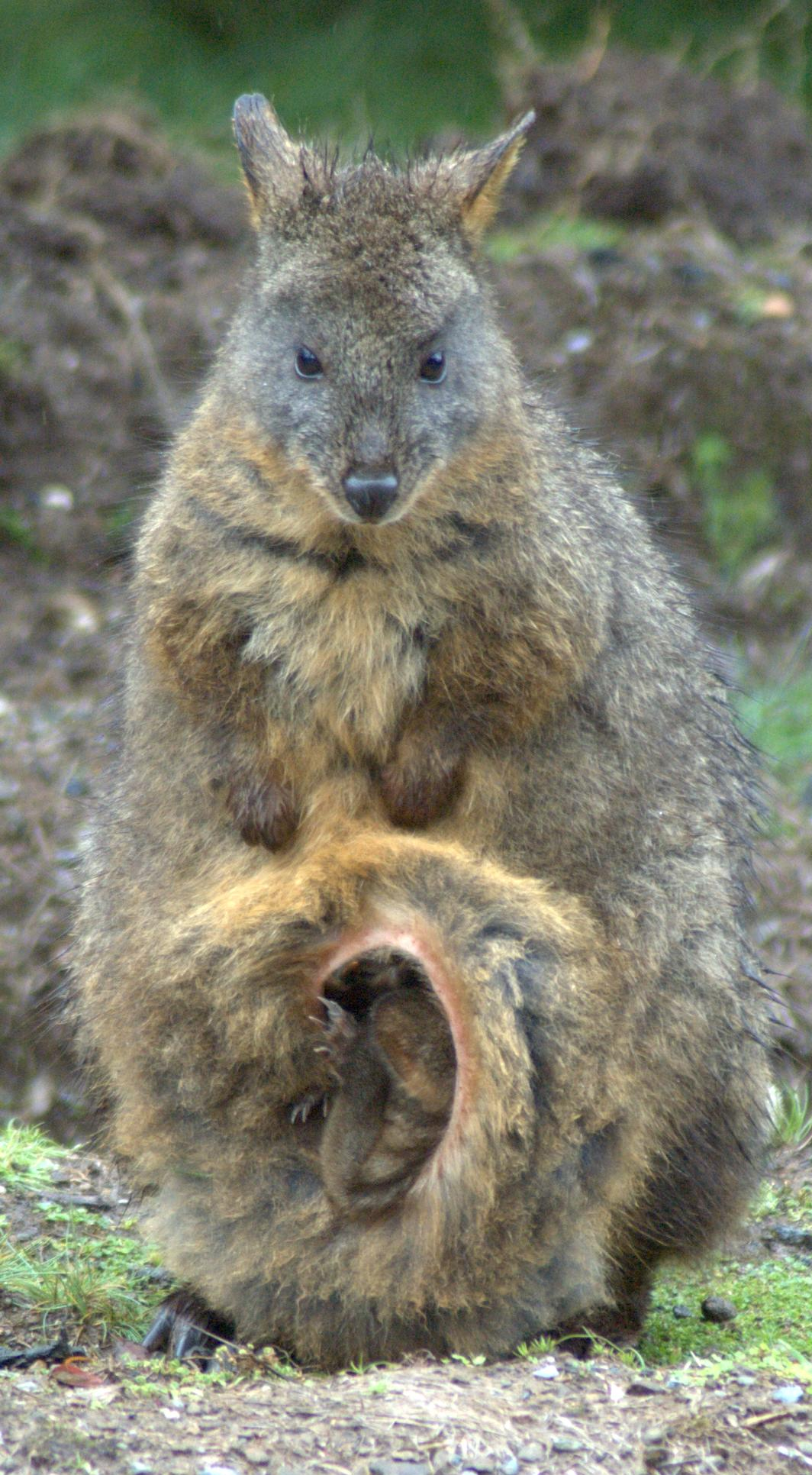 Мати та дитина падемелони під дощем Тасманіі